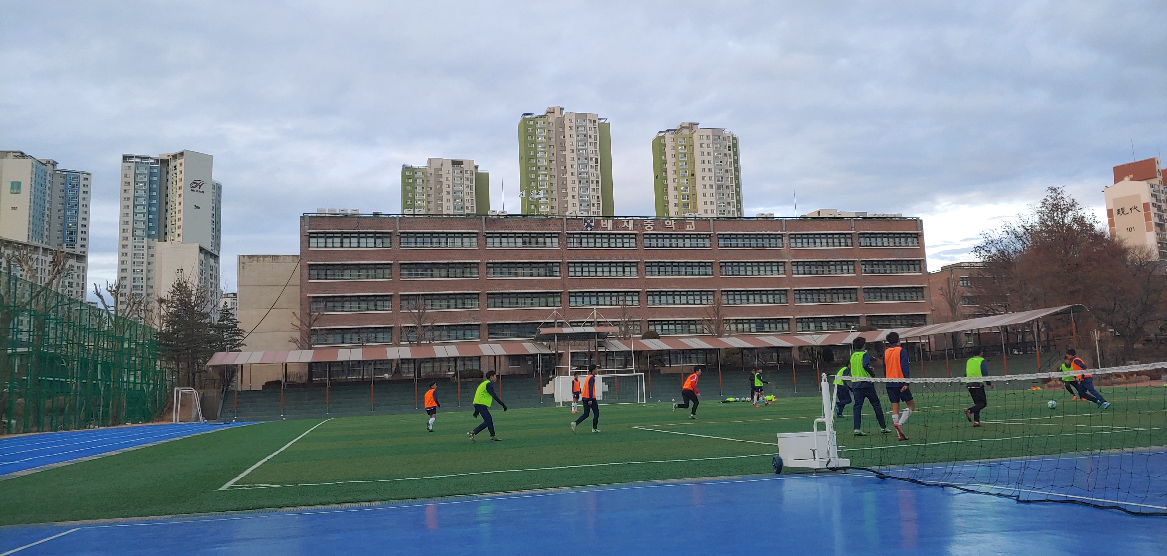 배재중학교, 서울 강동구